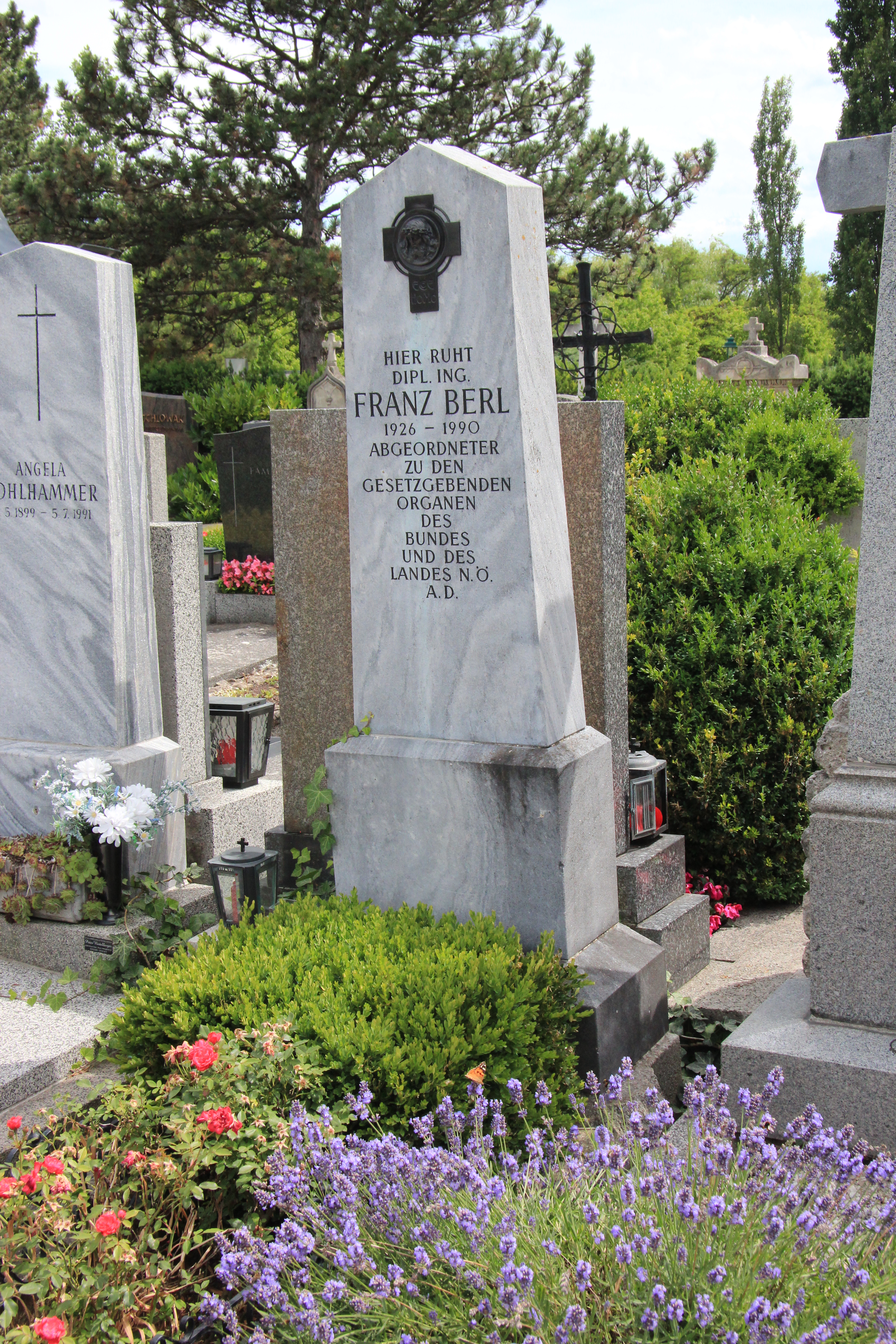 Grab auf dem Laxenburger Friedhof Template:DeGrabmal von Franz Berl